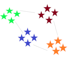 Representació de les agrupacions flexibles i la diversitat.